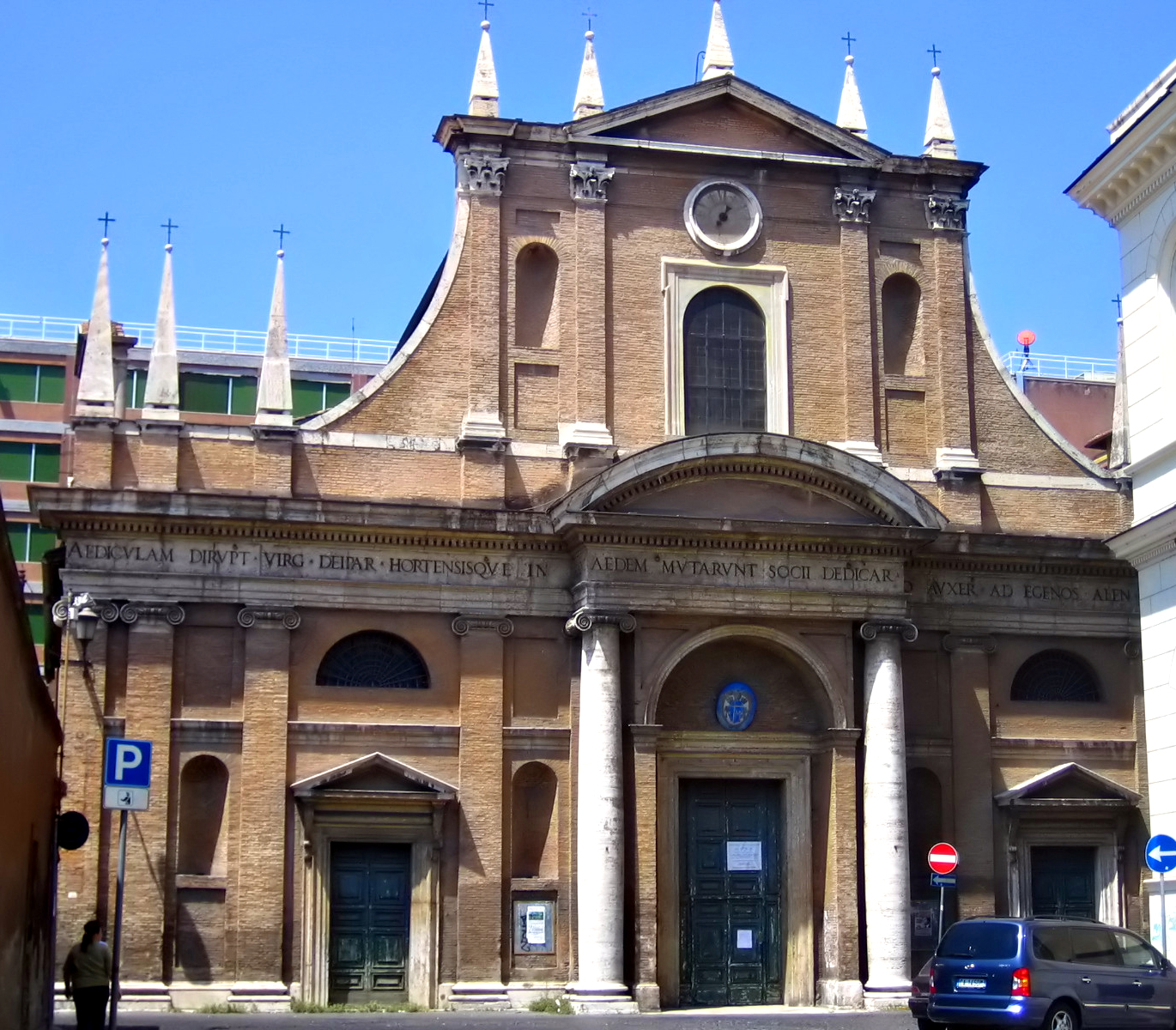 Santa Maria dell'Orto, Roma